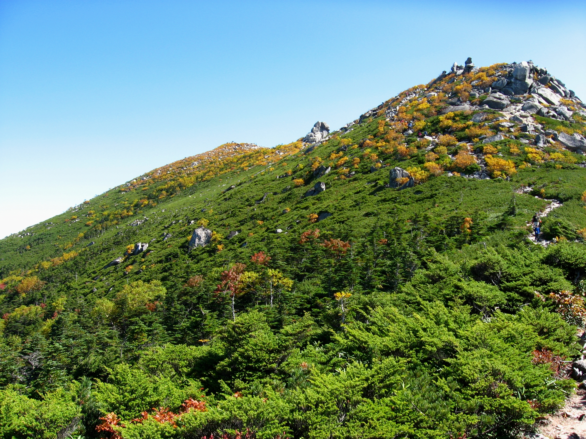 西側から見た金峰山